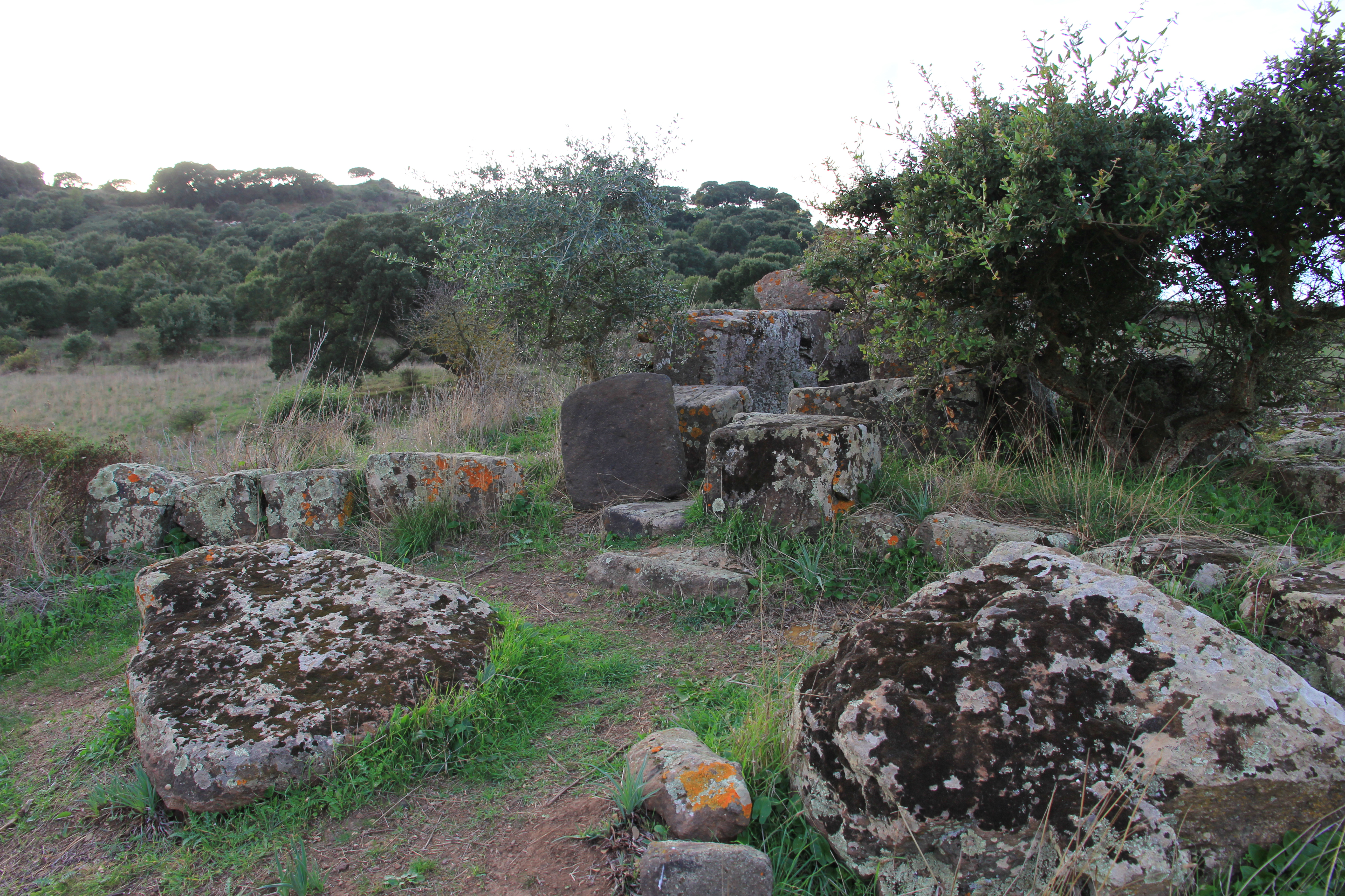 Villanova Monteleone - Tomba dei giganti di Laccaneddu